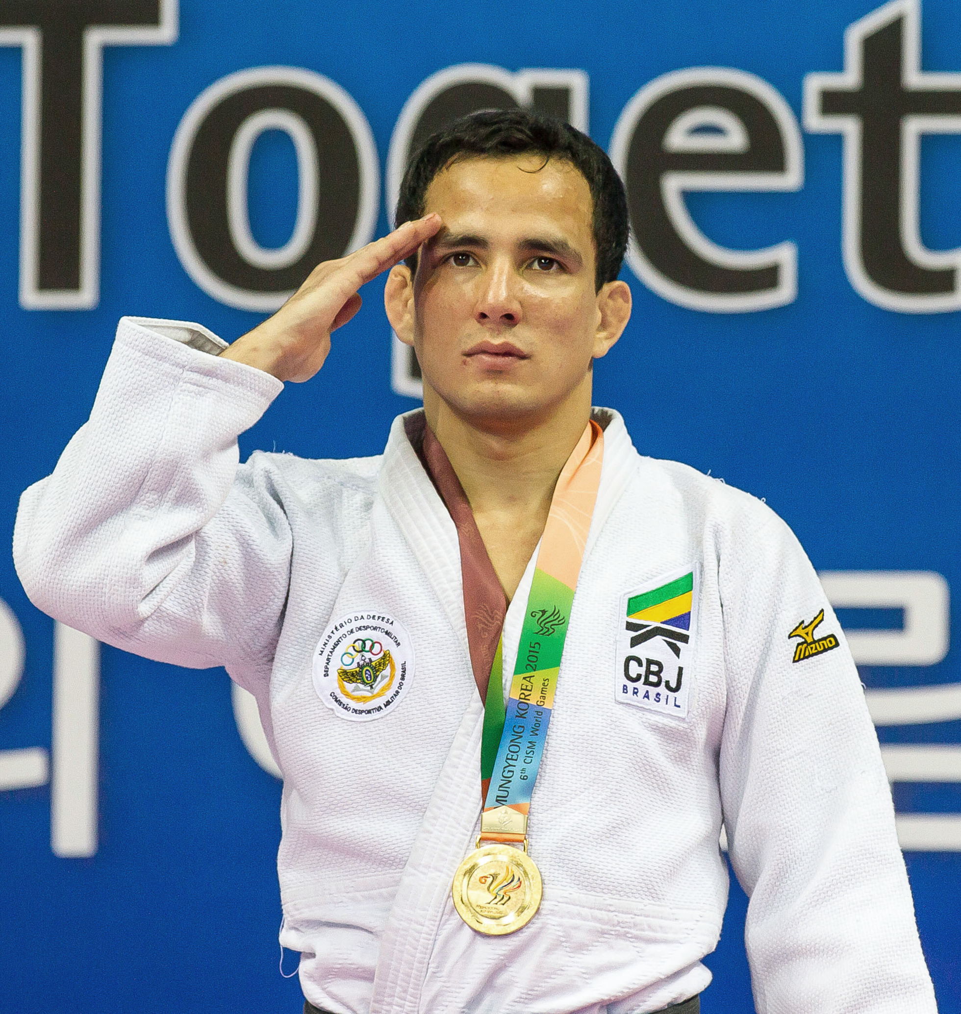 Premiação Judô na categoria até 60 Kg. Kitadai do Brasil leva o ouro. Foto: Johnson Barros